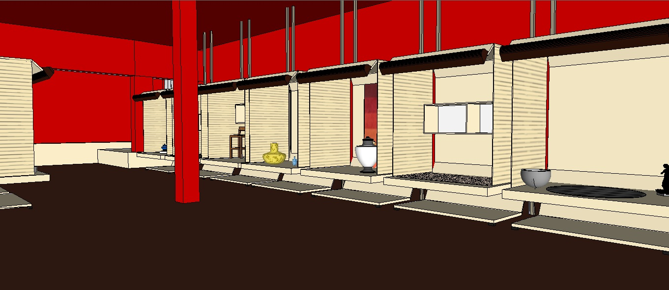 Vista della Mostra popolare italiana allestita dall'arch. Angelo Bianchetti per la XI edizione della Triennale di Milano